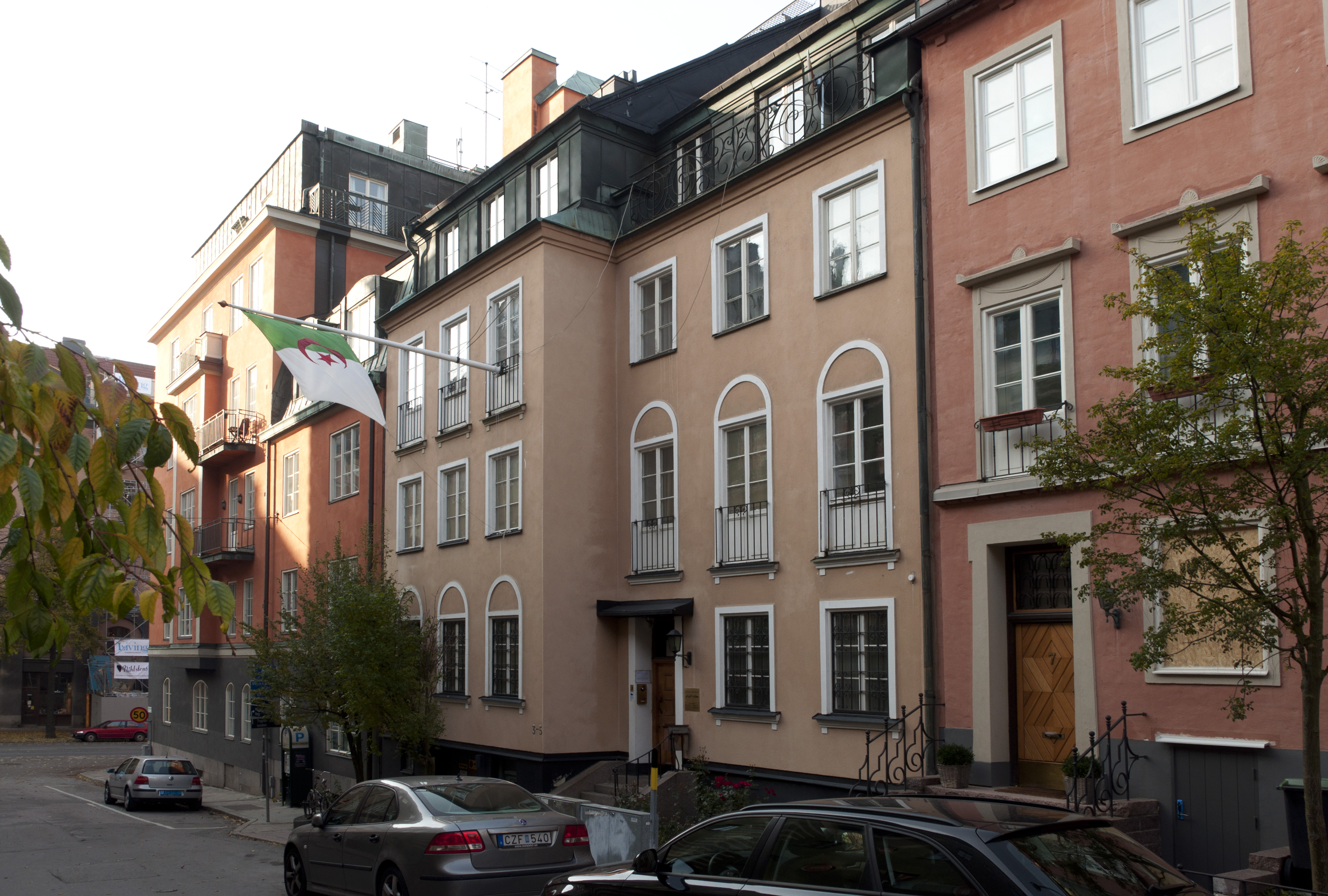 Danderydsgatan 3-5